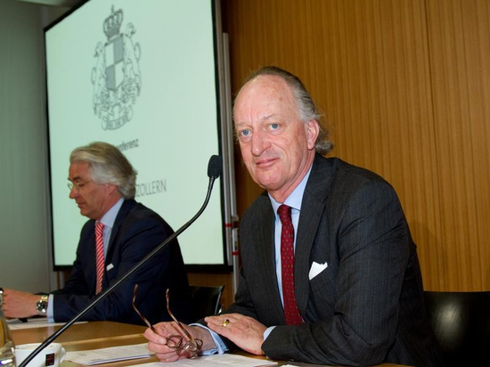 Fürst Karl Friedrich von Hohenzollern, Chef des Hauses Hohenzollern-Sigmaringen, bei der Festveranstaltung anlässlich des 950-jährigen Bestehens des Hauses Hohenzollern